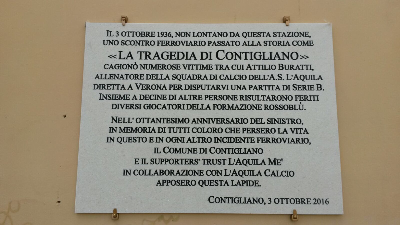 La targa apposta il 3 ottobre 2016 in occasione dell'ottantesimo anniversario della "tragedia di Contigliano", realizzata dal Comune di Contigliano e L'Aquila Me' in collaborazione con L'Aquila Calcio.